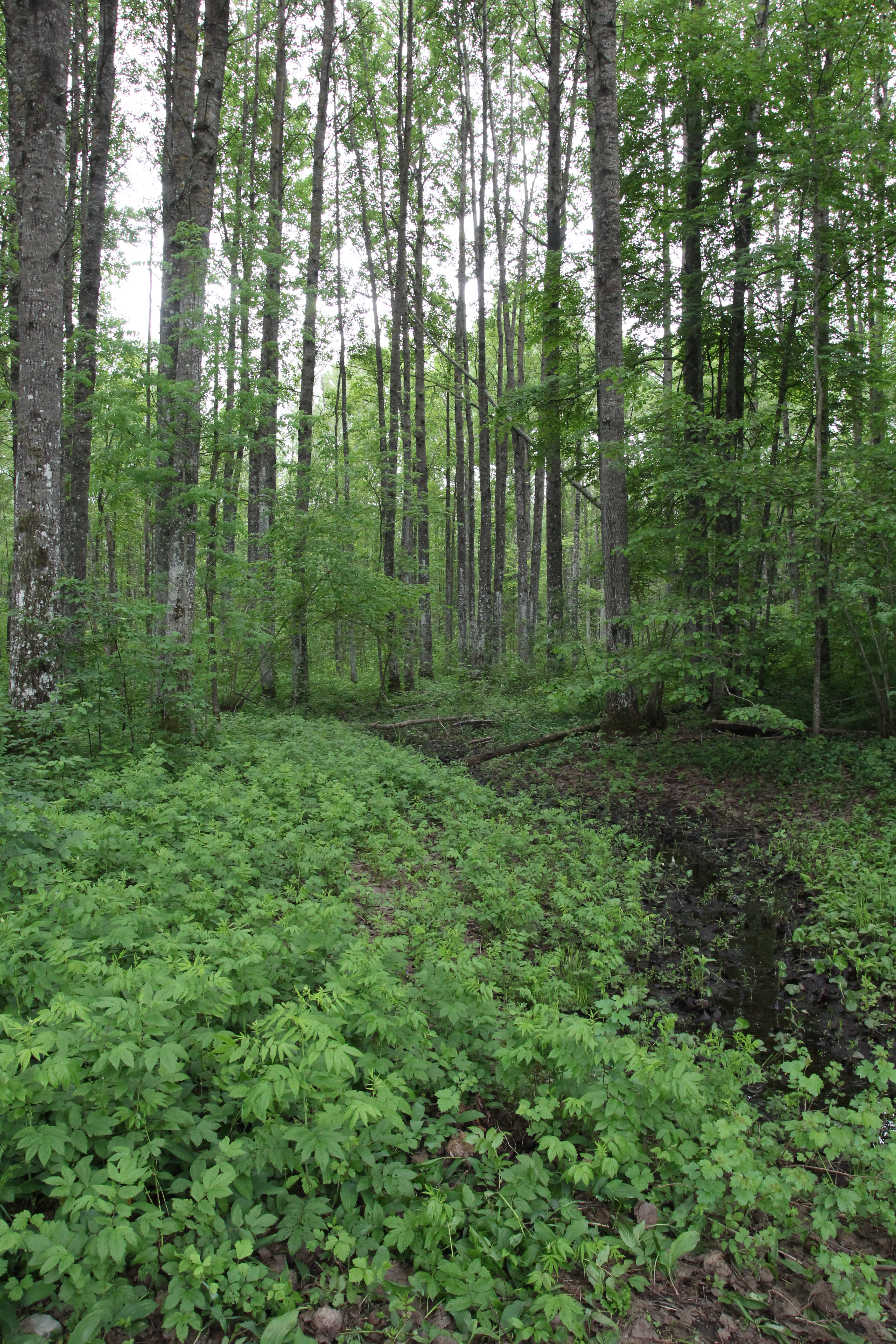 Lammimets Kirna matkarajal